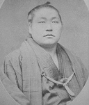 15th yokozuna, Umegatani Tōtarō I(初代梅ヶ谷藤太郎) (1845–1928)